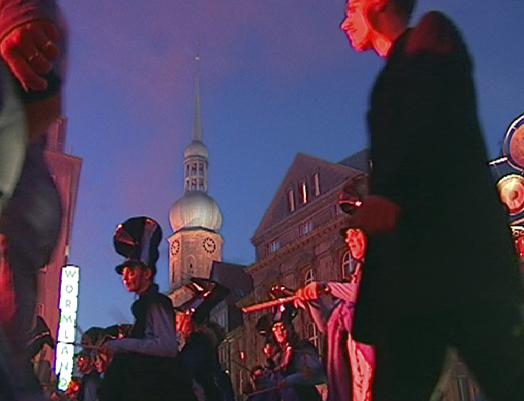 Internationale Kulturtage der Stadt Dortmund 2000, Transe Express: „Lâcher de Violons“ (Straßentheater)